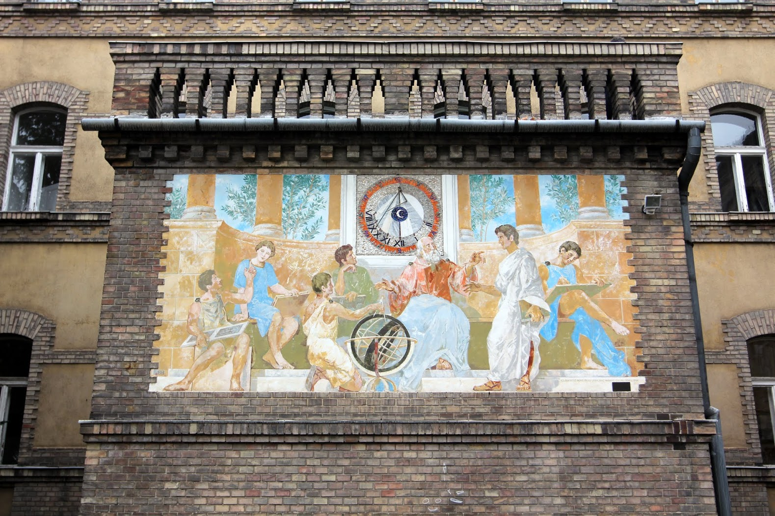 Napóra az iskola udvarán. Alkotók: Kölber Dezső (festőművész), Rác András (mozaikkészítő), Gulyás Dénes (festőművész), 1906. A freskón az athéni? iskola tanulói láthatók, amint egy görög bölcs tanítását hallgatják. Éppen csillagászati előadás folyik; alul egy armilláris szféra (gyűrűs gömb), felül egy napóra (tervezője Mikola Sándor fizikatanár). Az árnyékóra számlapja kör alakú, egy méter átmérőjű. Számozása VIII–XII–II, változó közű, negyedórás sűrűségű. Alul egy analemmagörbe (az időegyenlet grafikus ábrázolása) található, melyen fel vannak tüntetve a hónapok, körben pedig az állatövi csillagképek stilizált ábrái díszítik az időmérőt. 1952 után a freskó és a napóra eltűnt, 1991-ben Gulyás Dénes festőművész és Rác András mozaikművész újra elkészítette. - Budapest-Fasori Evangélikus Gimnázium. Budapest, Városligeti fasor 17-21.